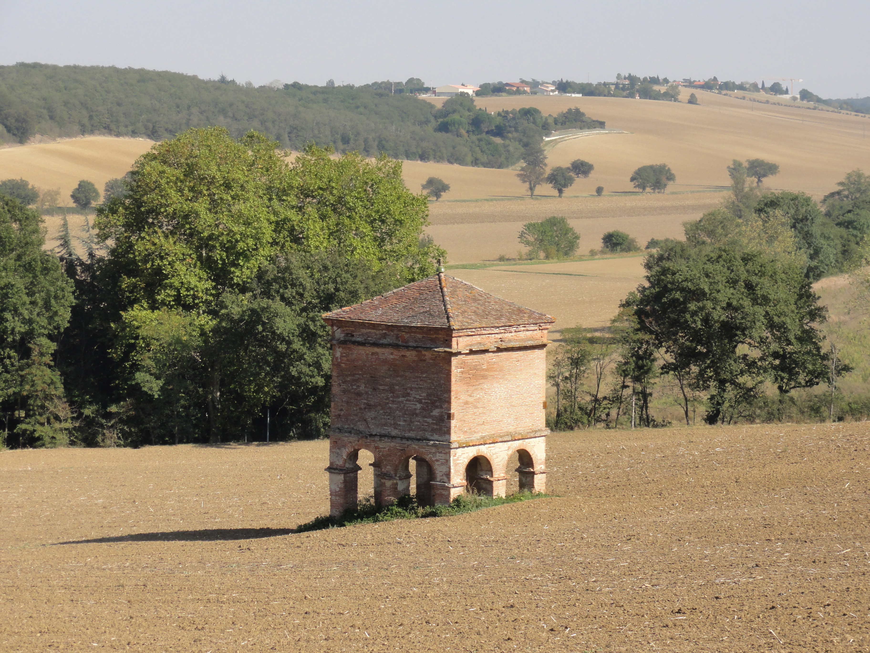 Pigeonnier de La Borie lieu-dit “Reynery”, XVIIe-XVIII-es. Site privé non visitable. .